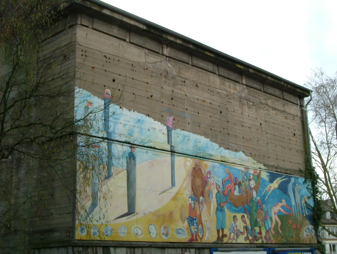 Bunker an der Sandkaulstrasse / Aachen: Kunstwerk an einer Bunkerwand, erstellt von südafrikanischen und deutschen Künstlern im Rahmen des von der Unesco-finanzierten "Mural Global-Programms" 2000; abgerissen 2014